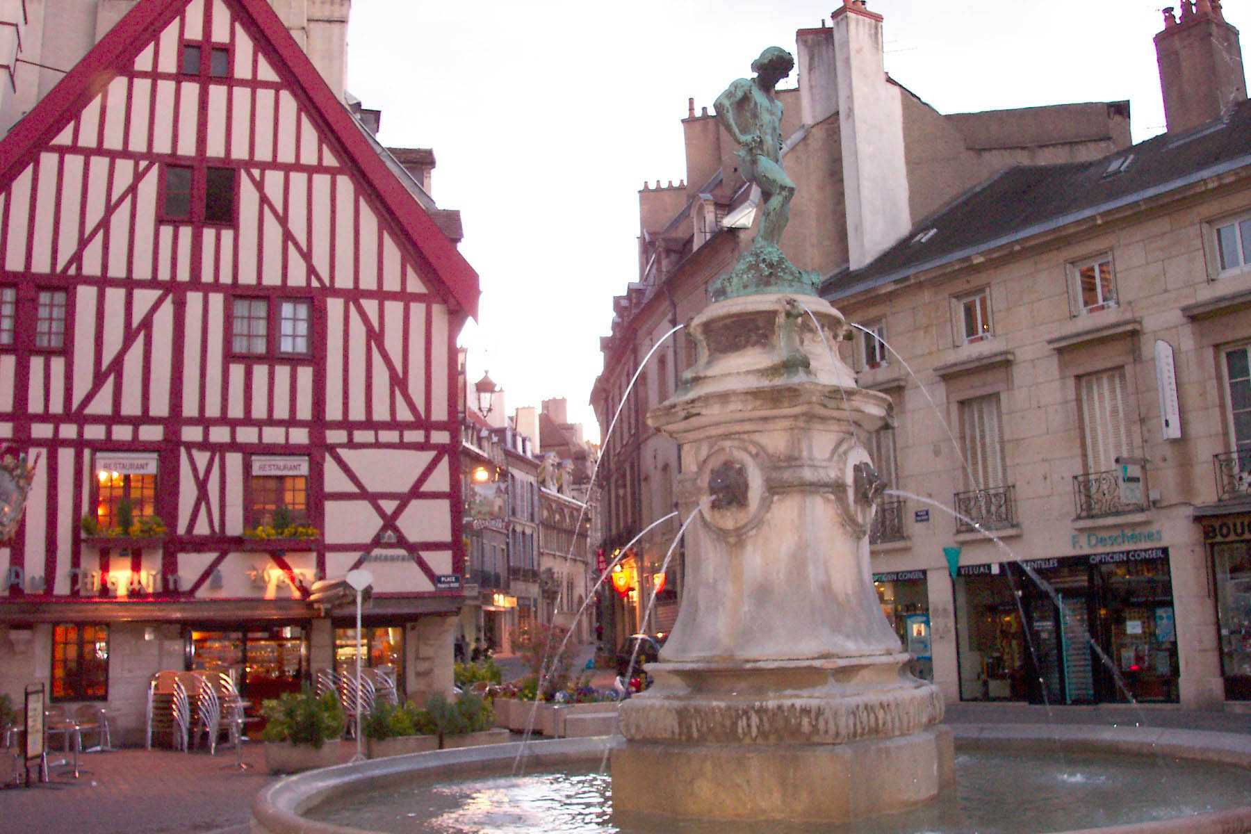 Dijon, Place François Rude (Place du Bareuzai)